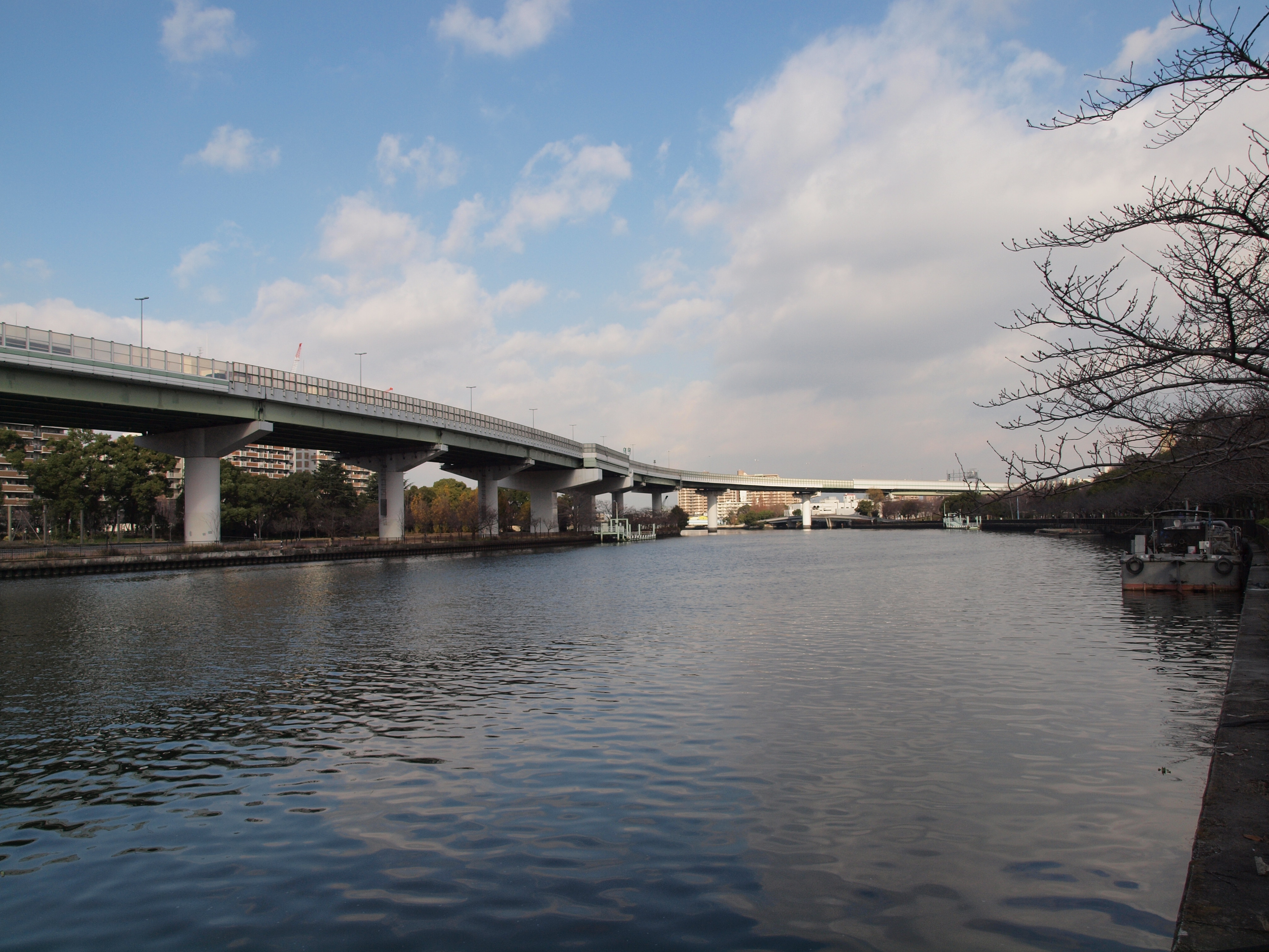 大川（旧淀川）（飛翔橋付近から毛馬水門方向を撮影。大阪市北区、都島区） 2008年12月撮影。 機材：E-30 撮影者：Kansai explorer